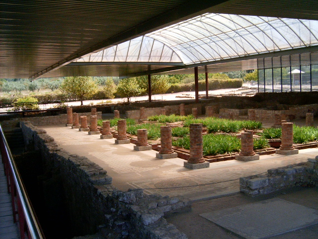 Casa das fontes, em Conímbriga